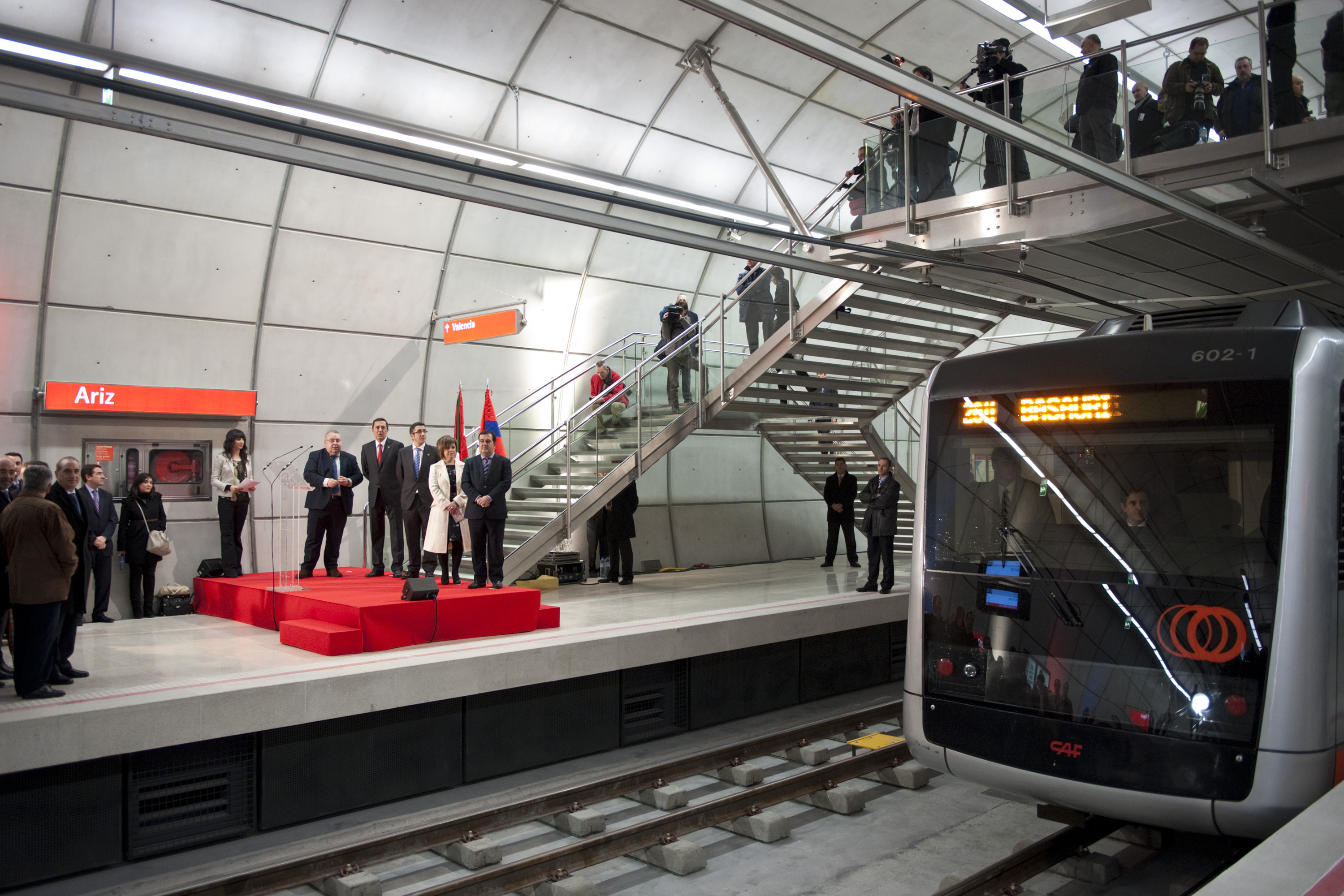 Ariz metro geltokiaren inaugurazioa